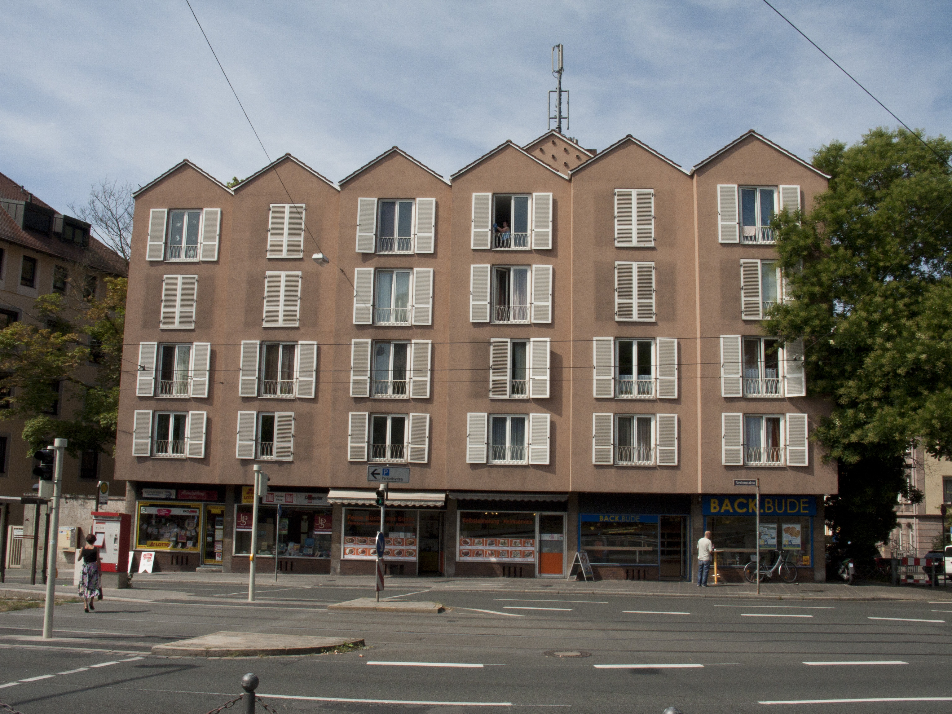 Nürnberg-St. Johannis, Haus Frommannstr. 1.